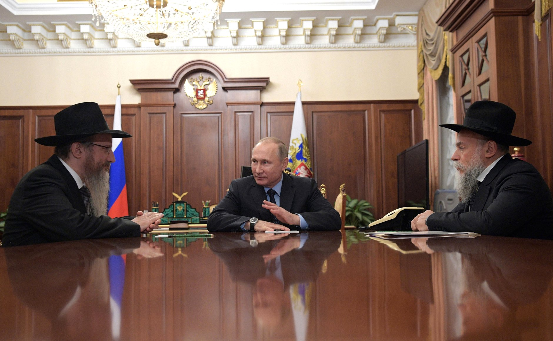 Президент России Владимир Путин с главным раввином России Берлом Лазаром и президентом Федерации еврейских общин Александром Бородой